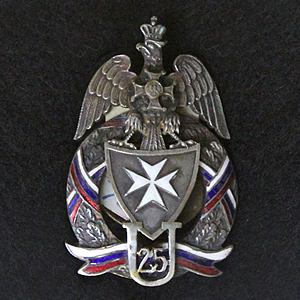 Odznaka 25 p.uł.